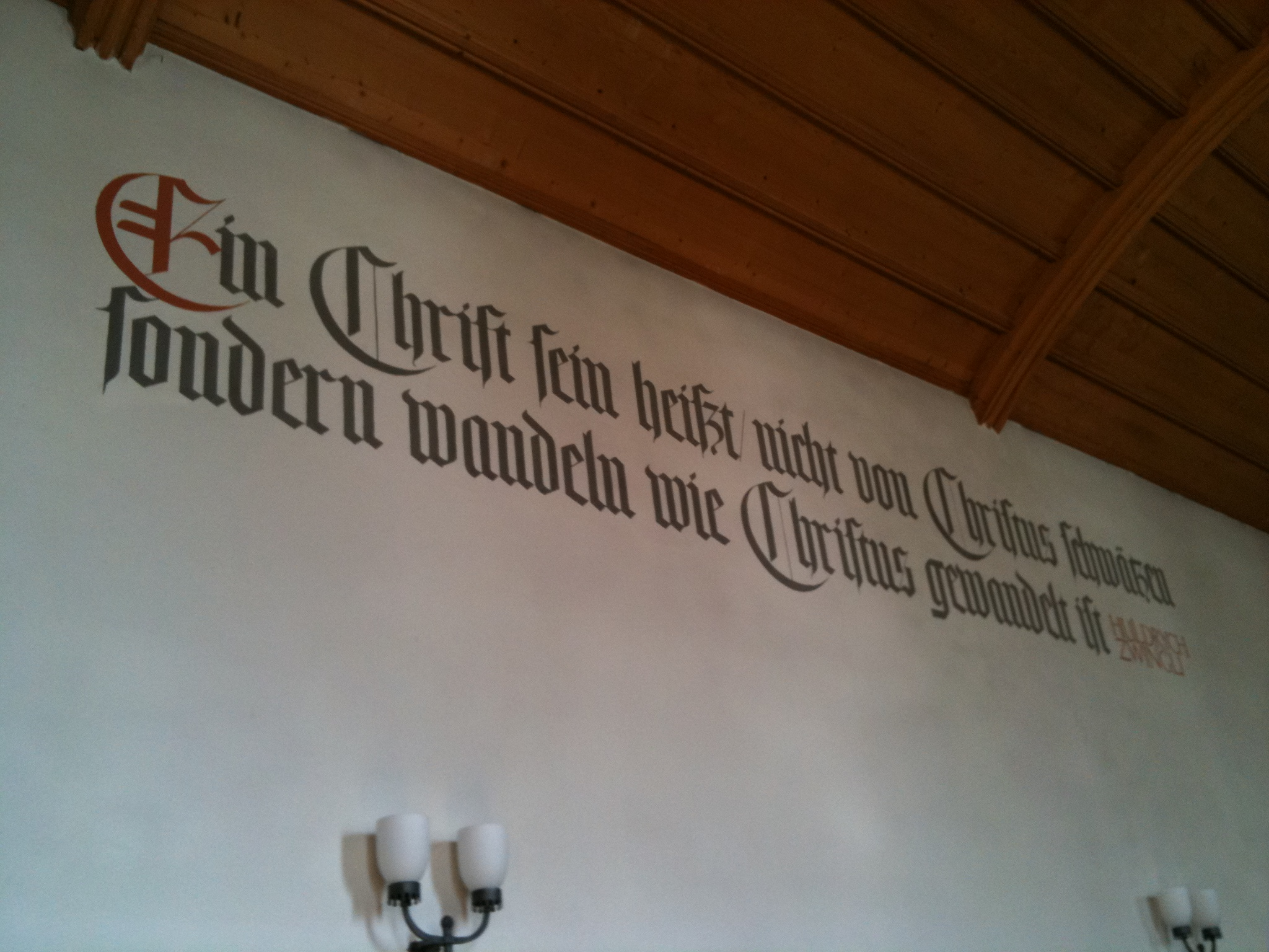 Zitat Zwingli in der reformierten Kirche Felsberg (nahe bei Chur) Ein Christ sein heiszt/ nicht von Christus schwätzen sondern wandeln wie Christus gewandelt ist HULDRYCH ZWINGLI